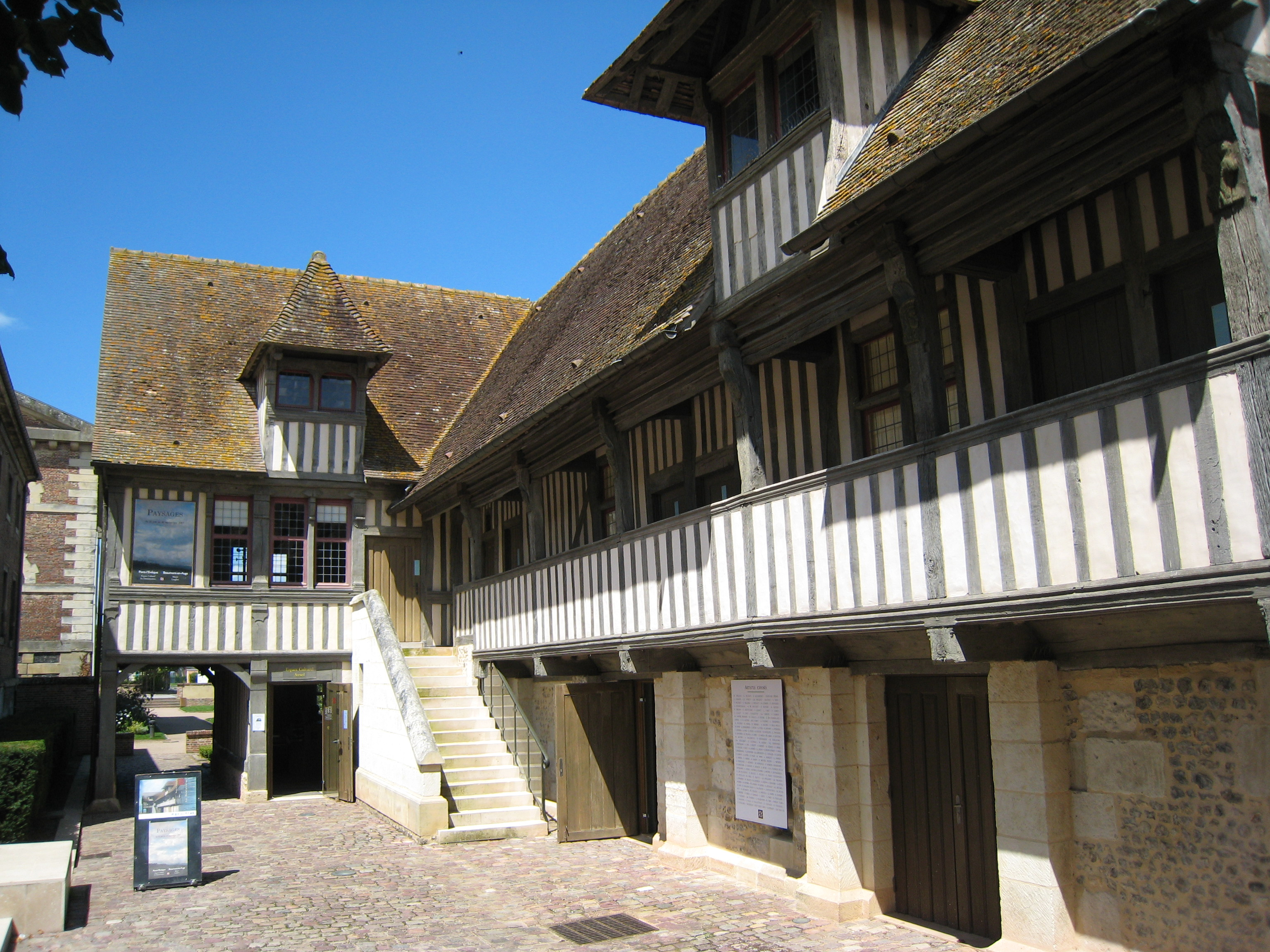 Ancien couvent des Dominicaines de Pont-l'Évêque (Calvados, France)